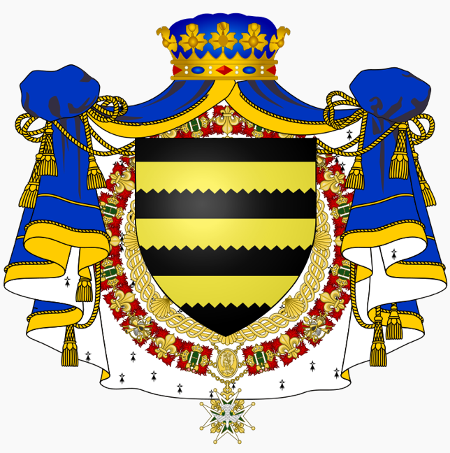 armoiries cossé brissac